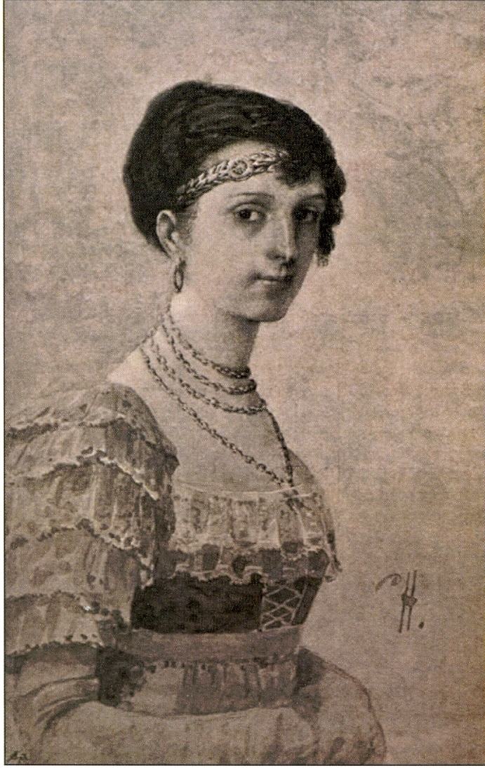 Majthényi Anna (Mezőnyárád, 1789. október 18.-Csesztve, 1885. május 22). Madách Imre író édesanyja.